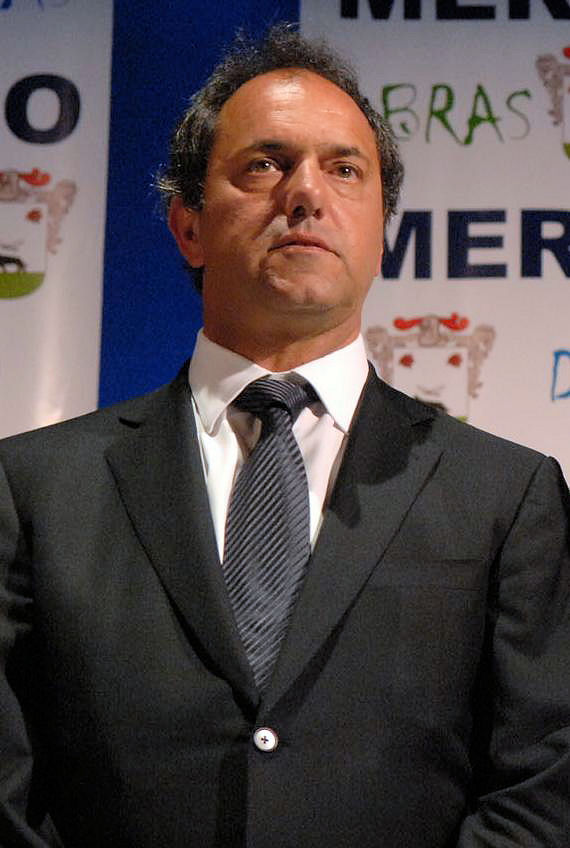 Daniel Scioli, durante un acto en Merlo, Buenos Aires, 3 de noviembre de 2008.